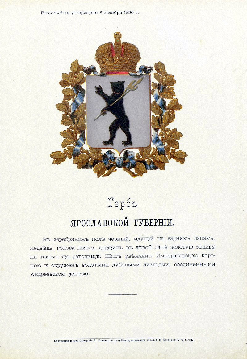 Official Russian Empire coat of arms Yaroslavl Governorate. Герб Российской Империи Ярославской губернии с официальным описанием в Гербовнике Бенке. Утверждён Императором Всероссийским Александром Вторым в 1856 году.